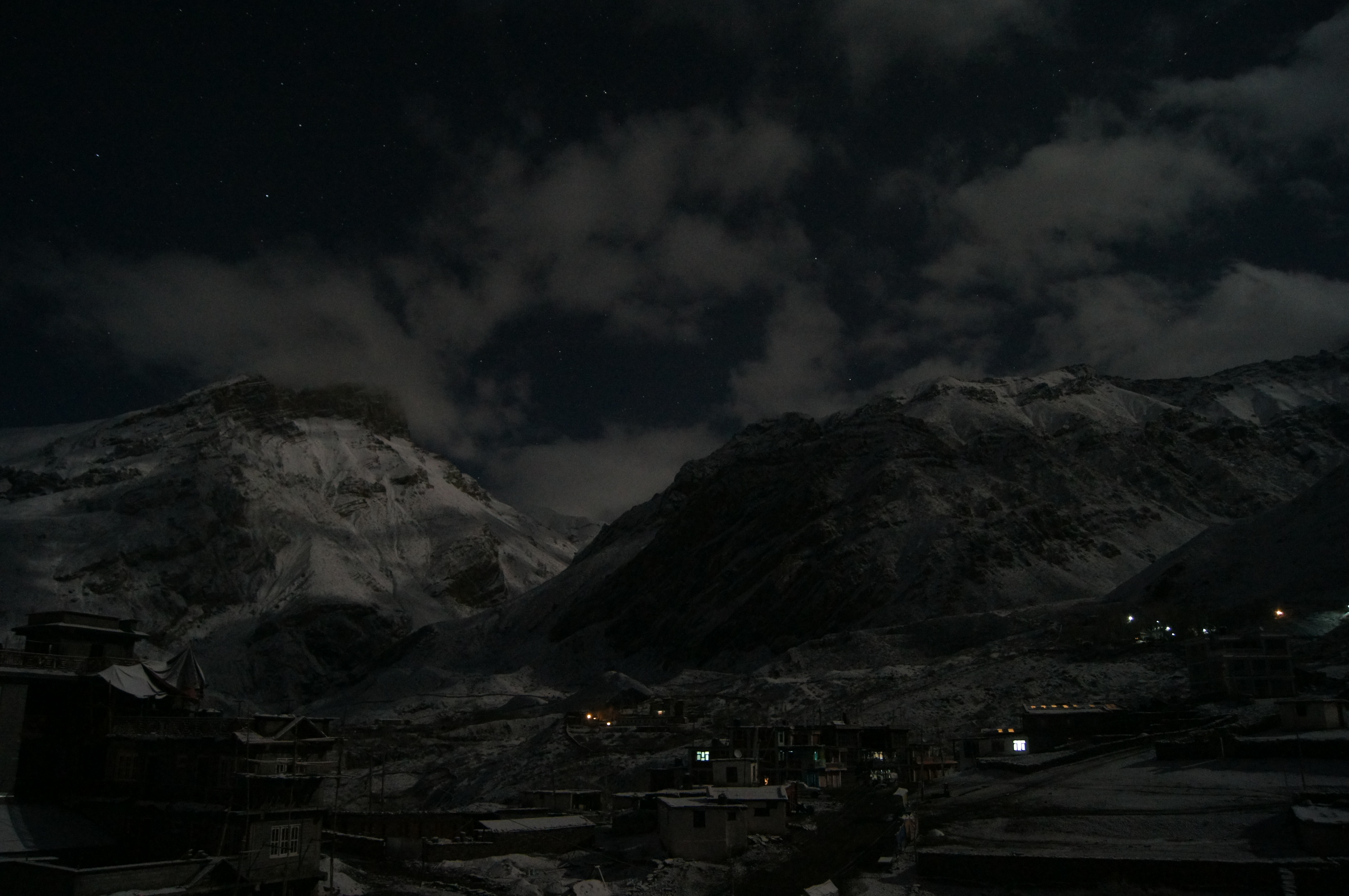 Ranipauwa bei Nacht, Blick Richtung dem Tempel von Muktinath sowie dem Thoron-La-Pass (Teil des Anapurna-Rundweges, Nepal)